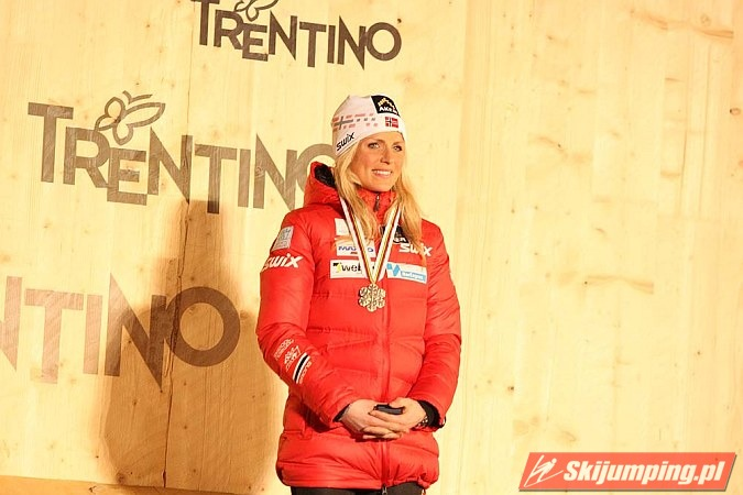 Dekoracja medalowa biegu indywidualnego kobiet na 30 km techniką klasyczną